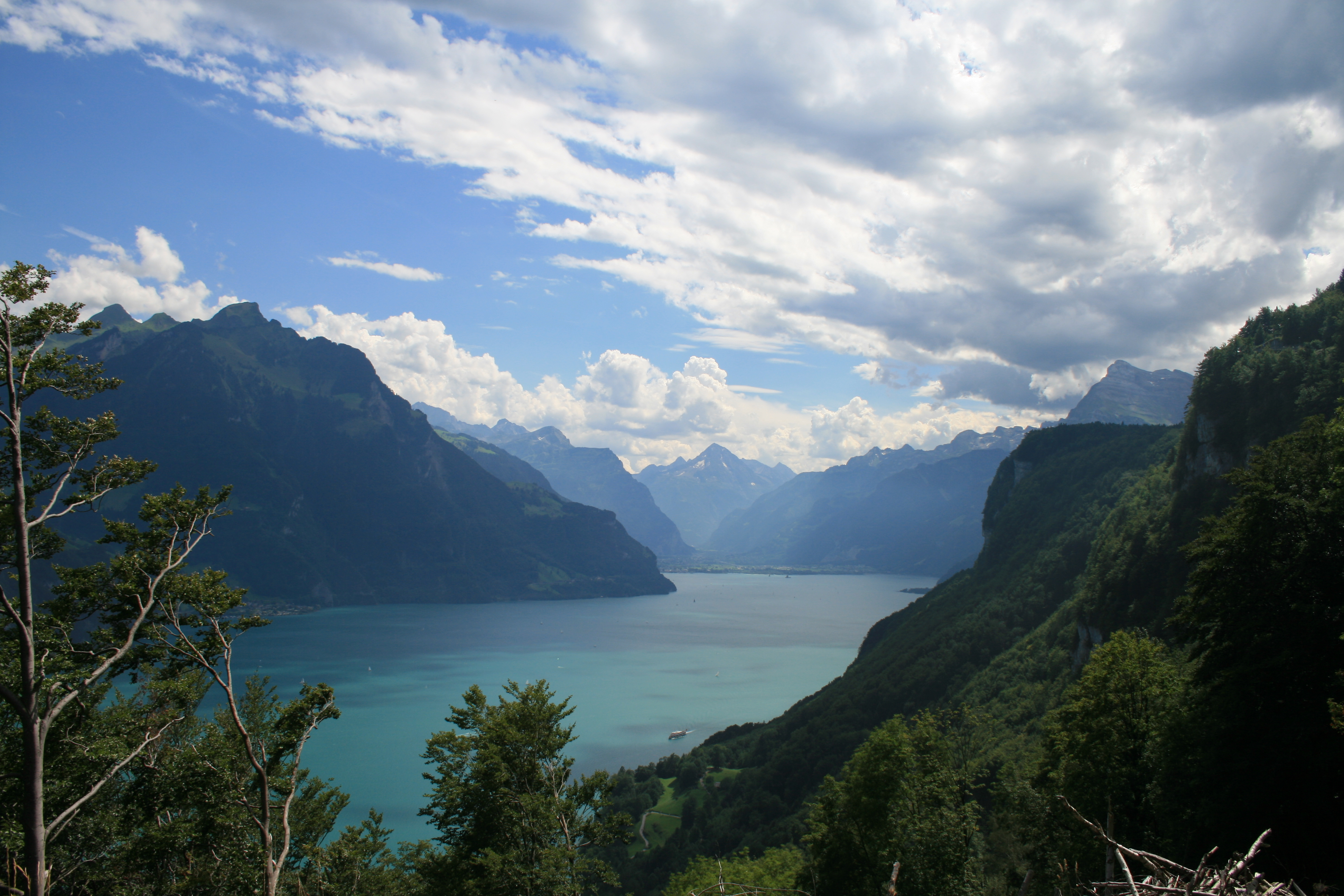 Blick von Seelisberg auf den Urnersee